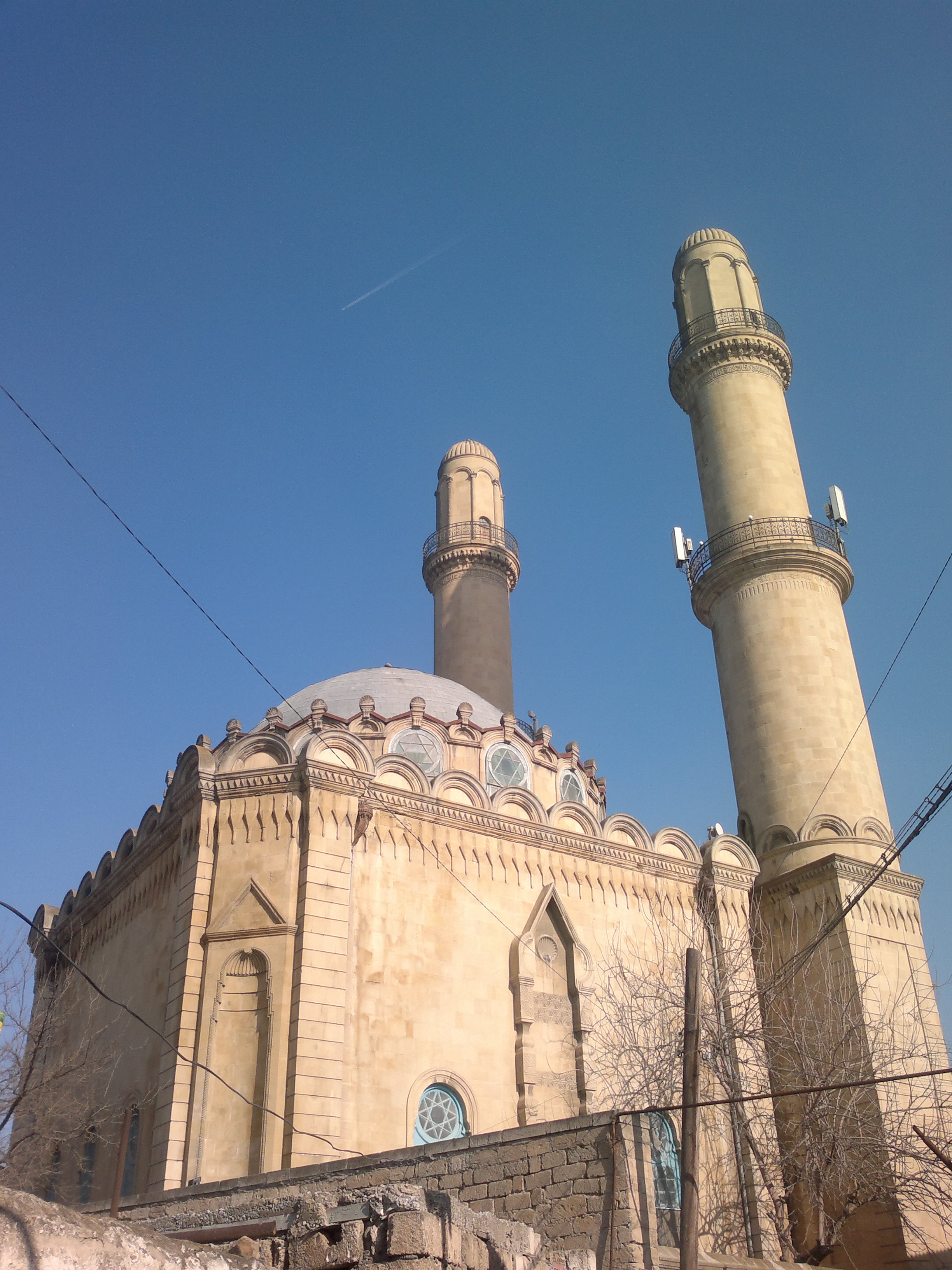 Murtuza Muxtarov məscidi